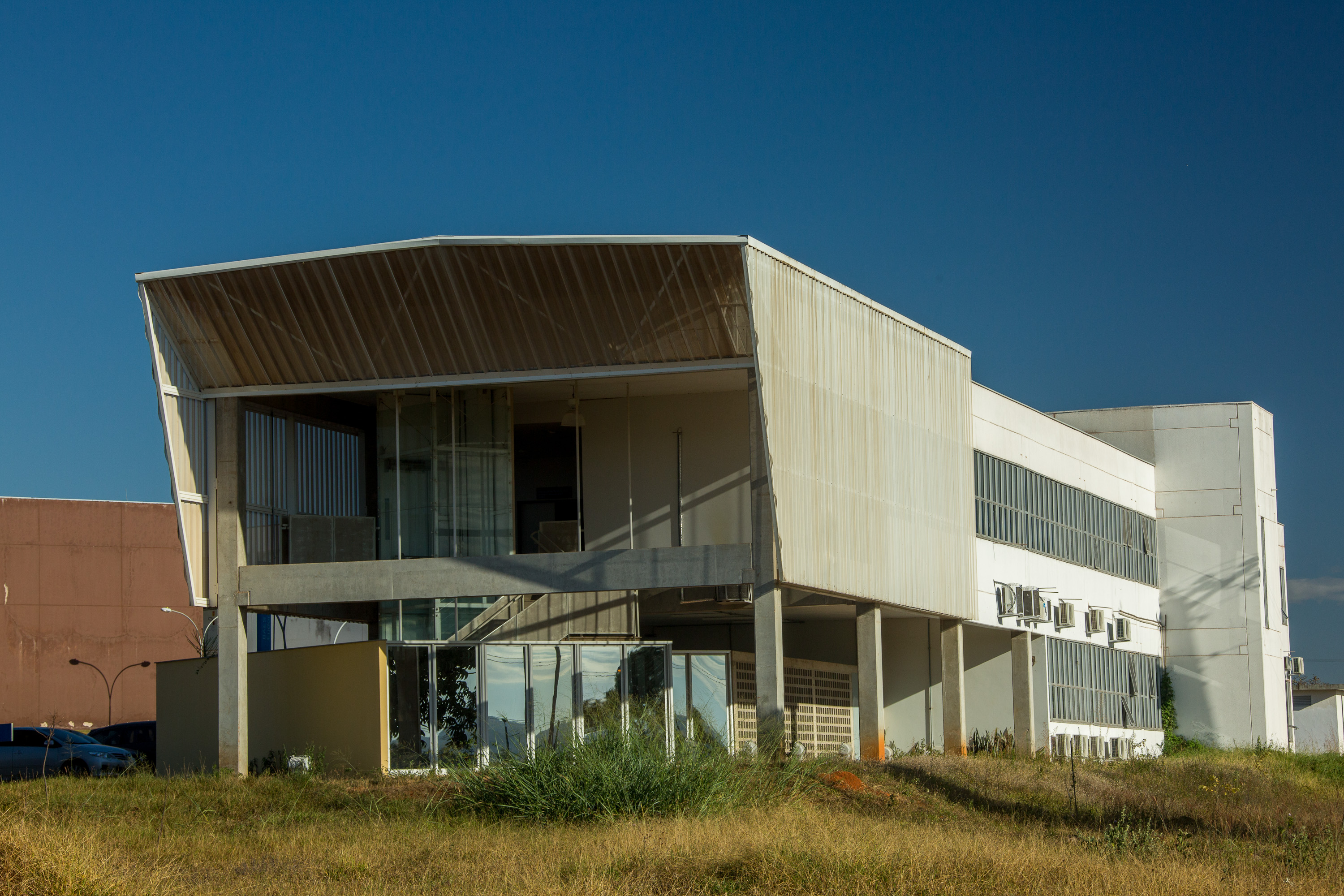 Vista do Bloco Eudoro de Sousa, localizado no Campus Universitário Darcy Ribeiro. Foto: Luis Gustavo Prado/Secom UnB